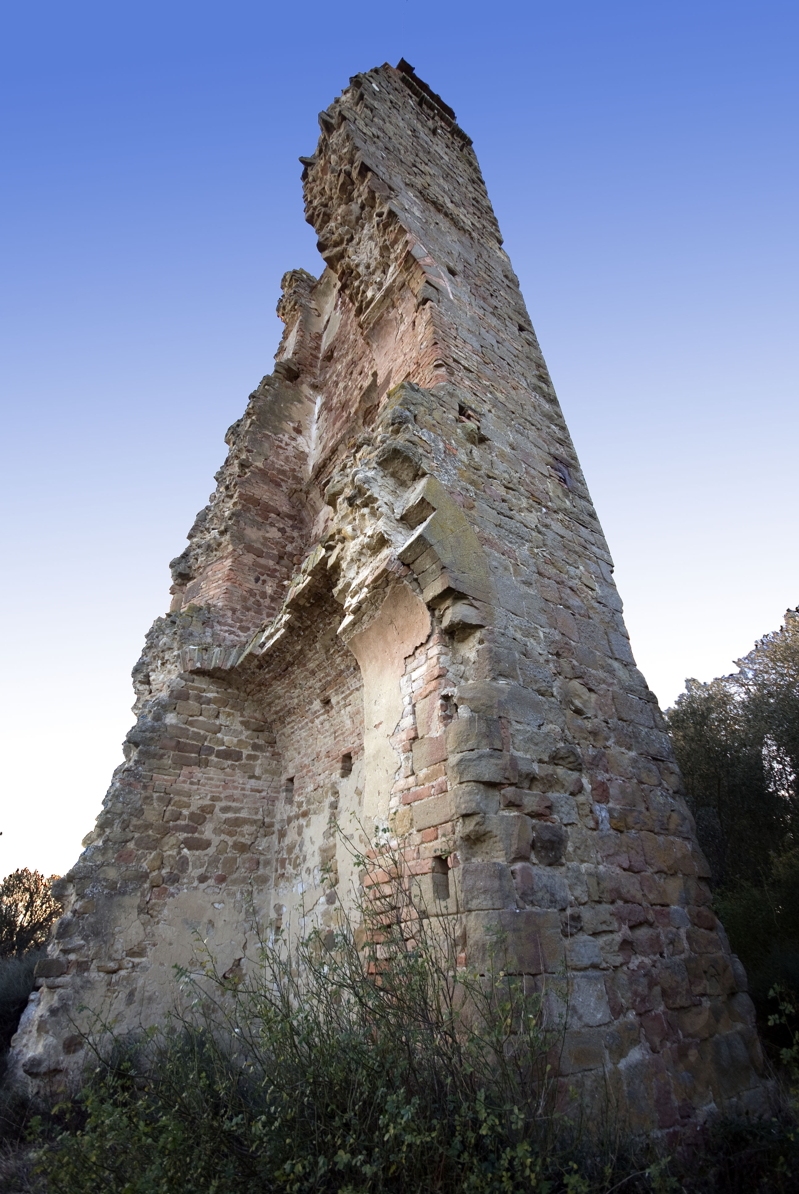 Ruderi del catello di pogni (certaldo)